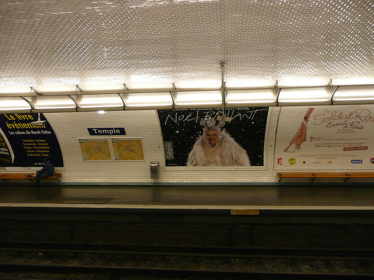 Station Temple du métro de Paris.